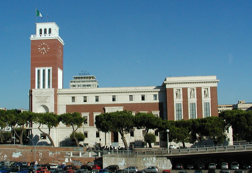 Gebäude des Stadtverwaltung in Pescara